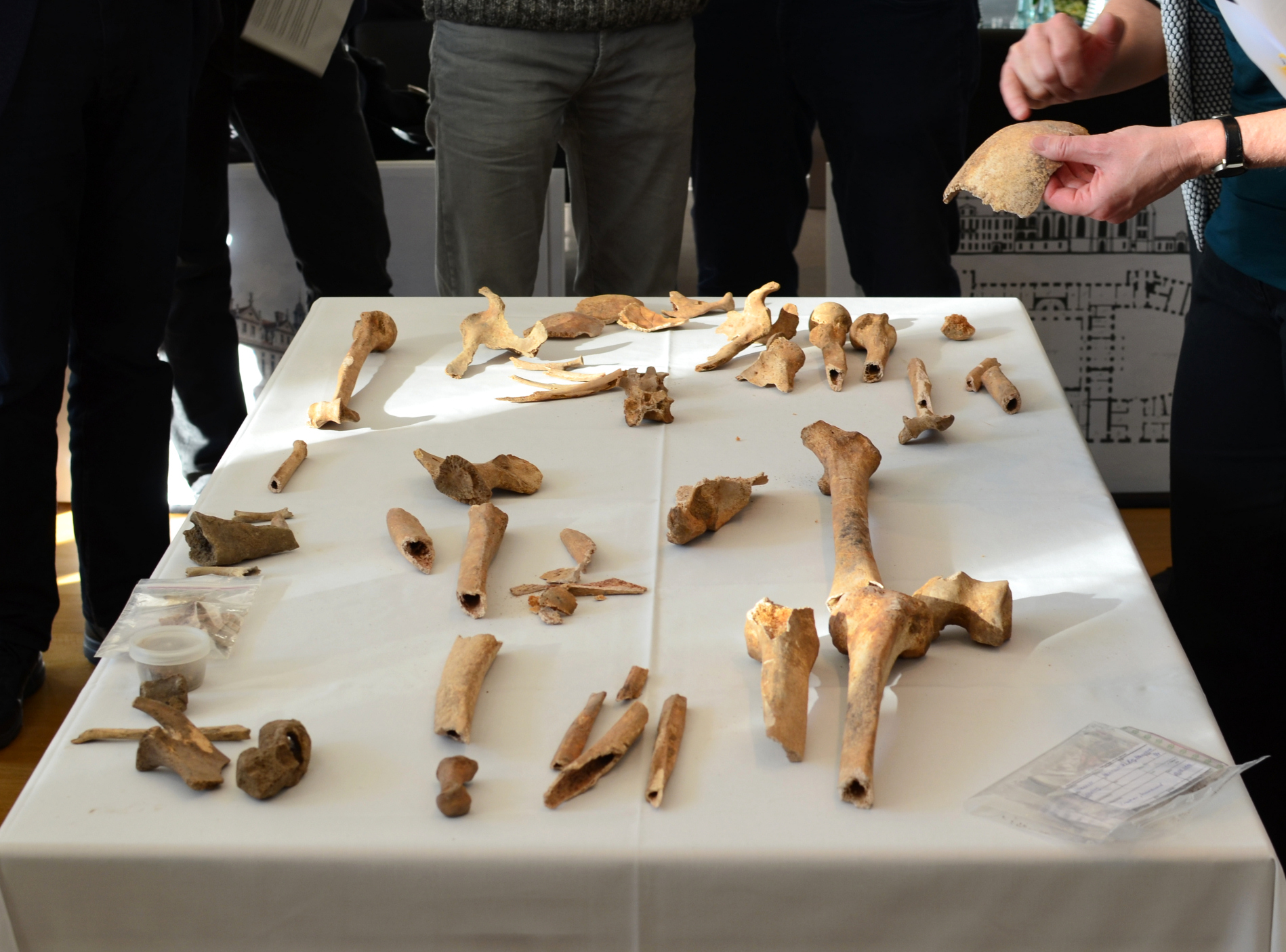 Präsentation der Knochenfunde von August 2016 im Niedersächsischen Landtag